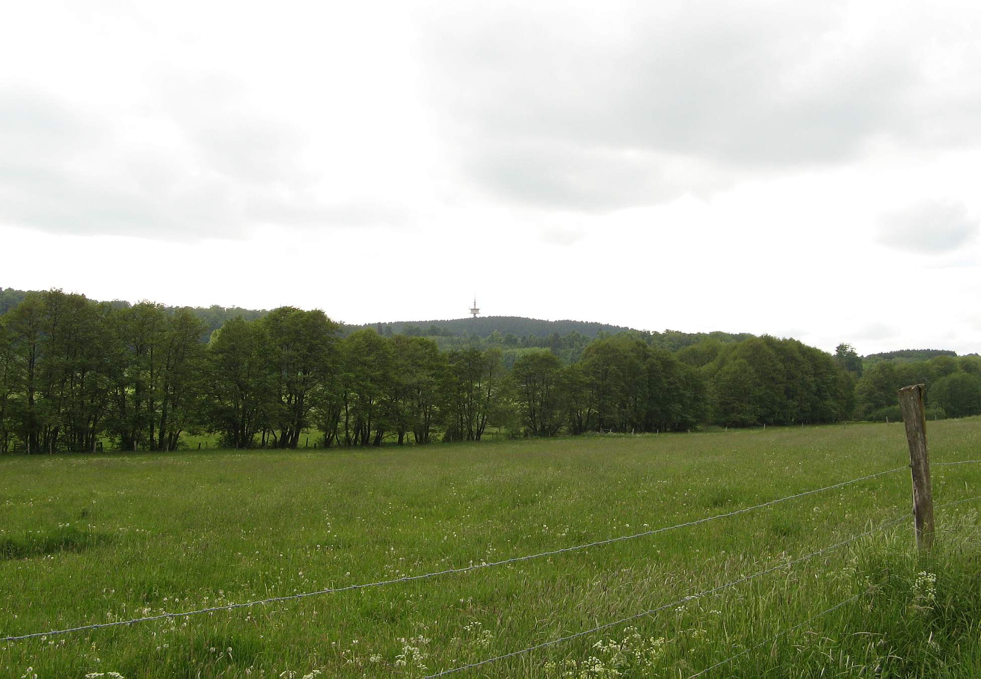 Der Höllberg ist der höchste Berg des Westerwald in Hessen